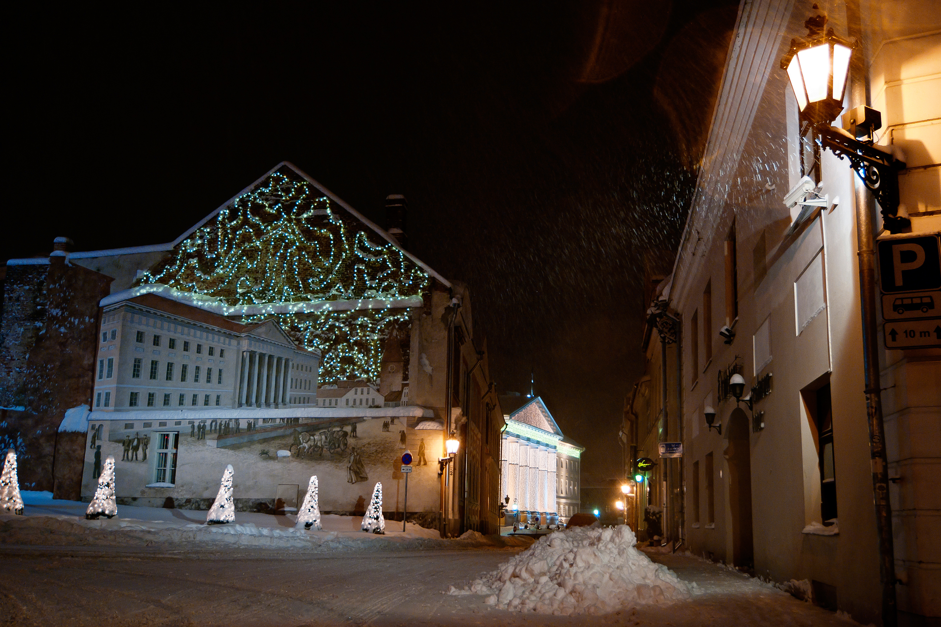 Tartu. Von Bocki maja (elamu Ülikooli 16). 1780-1786. Jõuluaegne vaade.